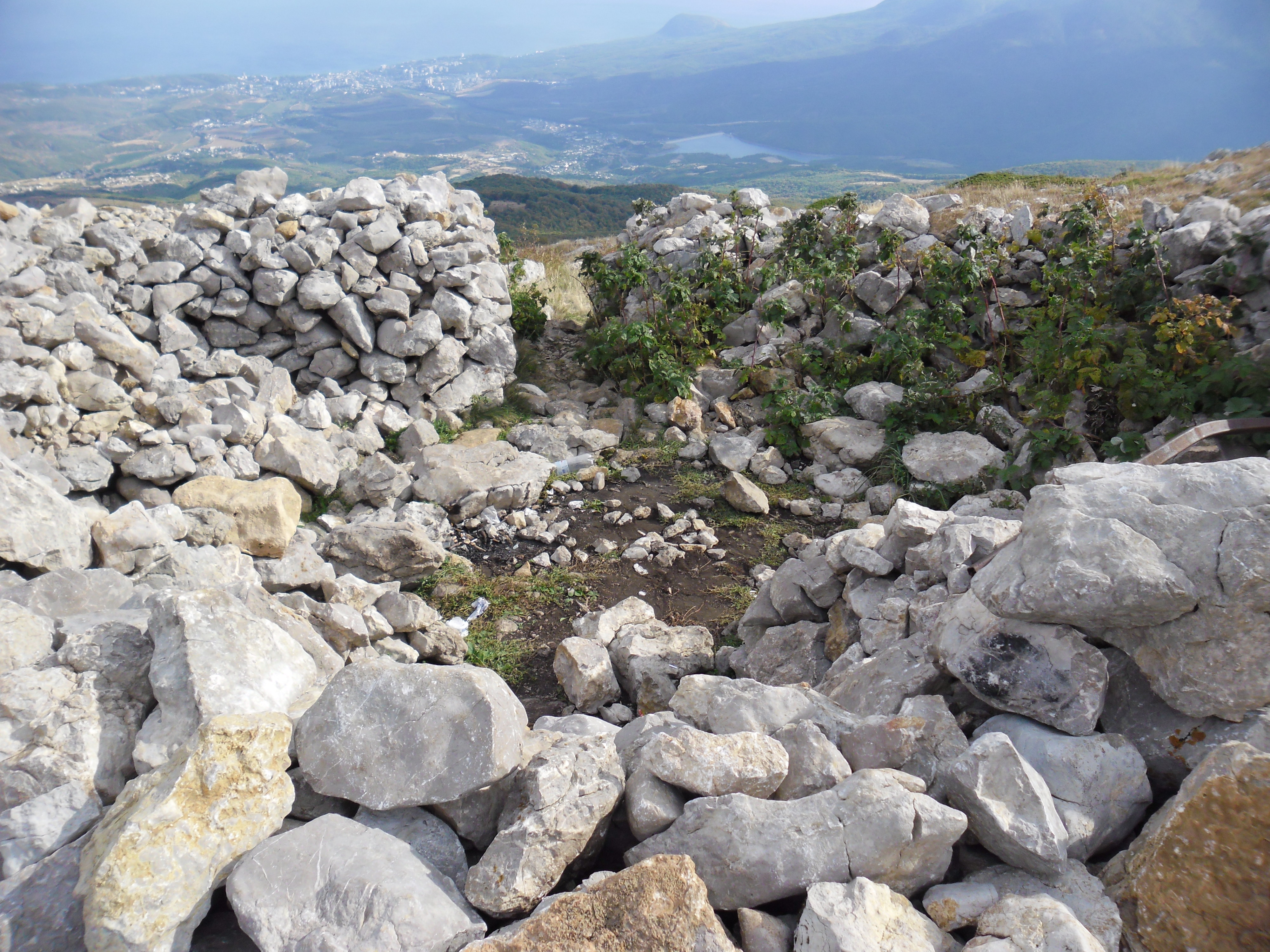 Чатир-Даг. Бівуак.: Фото